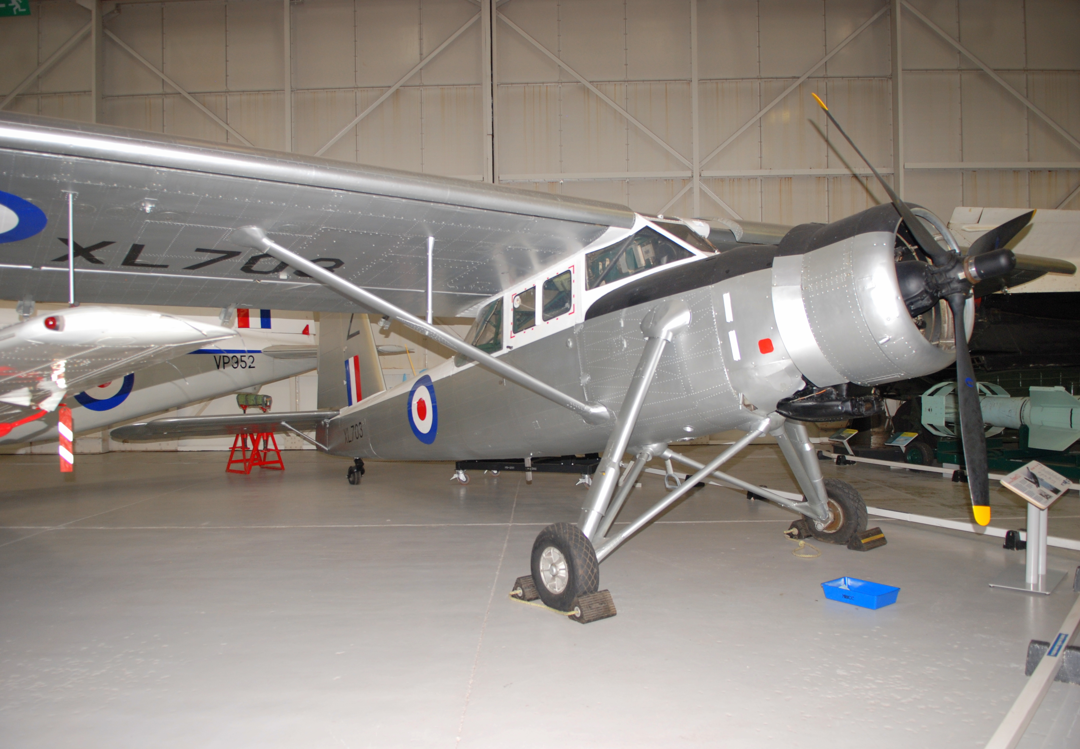 Scottish Aviation Pioneer aufgenommen in RAF Museum in Cosford am 10.07.2012